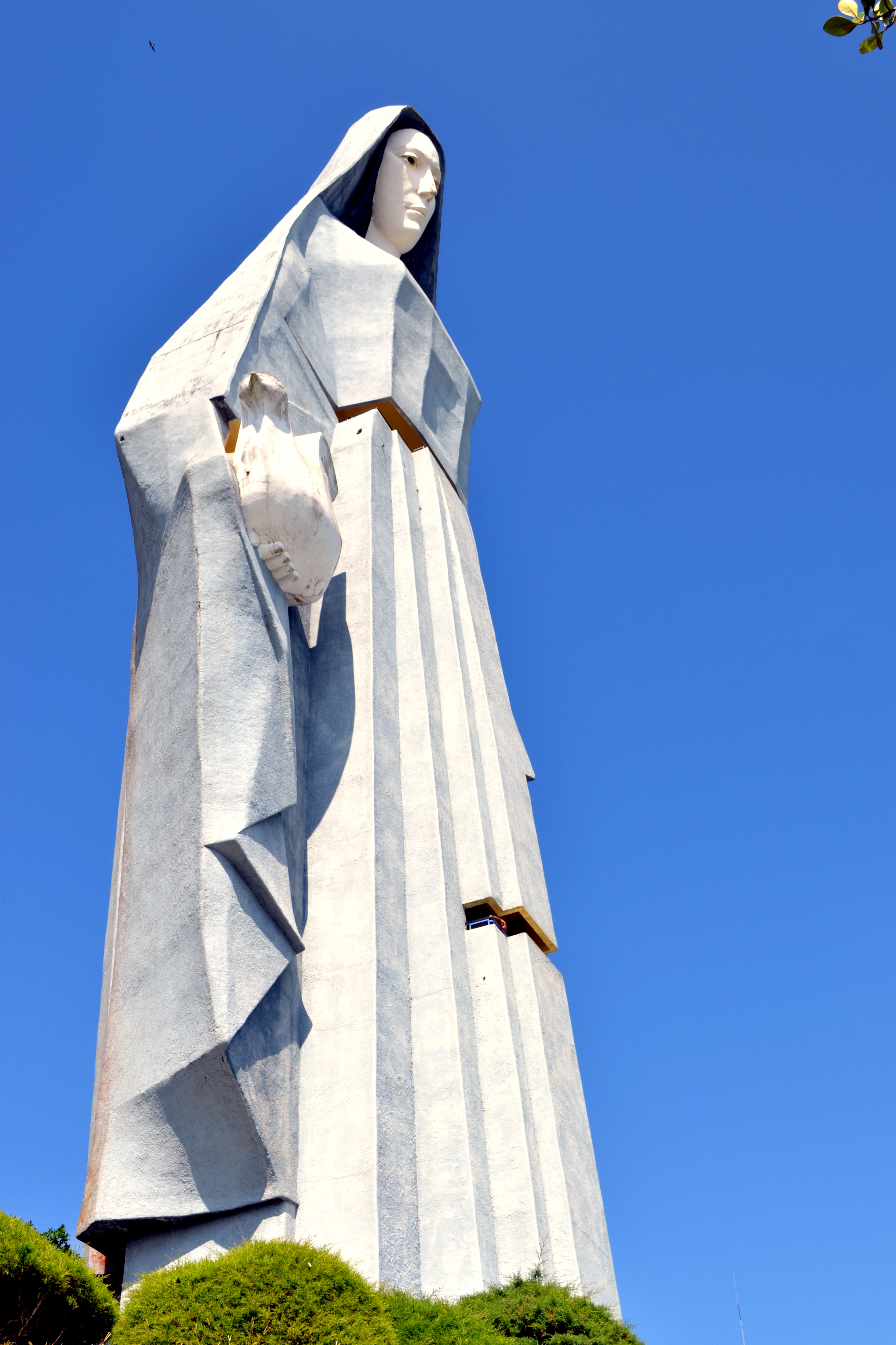 Imponente y sagrado monumento, en homenaje a la Virgen María.